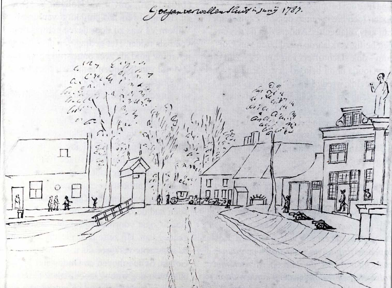 De internering van Wilhelmina van Pruisen in de boerderij van Adriaan Leeuwenhoek bij de Goejanverwellesluis